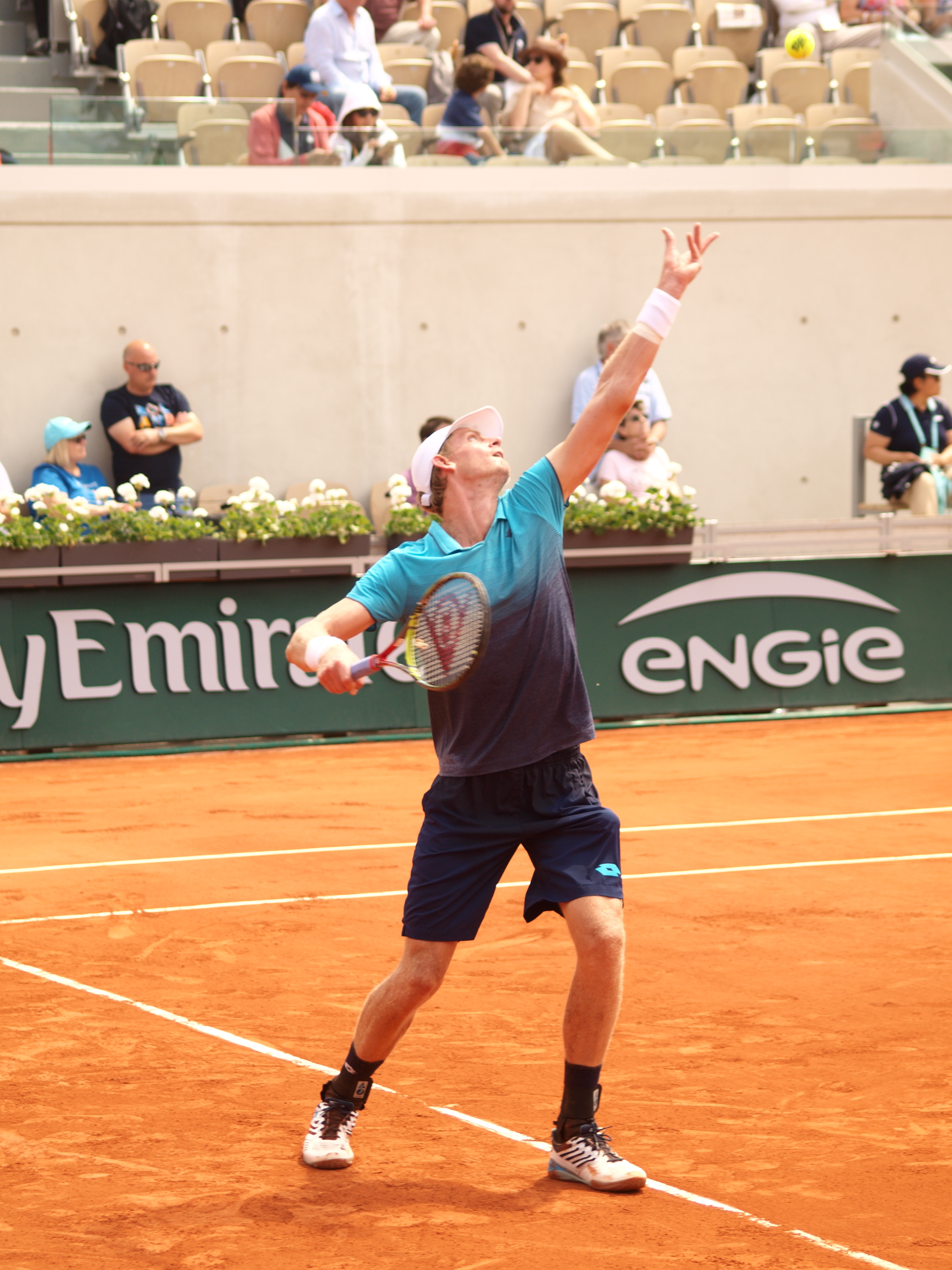 Kevin Anderson lors de son match contre Diego Schwarzmann, sur le cours Suzanne Lenglen (stade Roland Garros à Paris), le 4 juin 2018